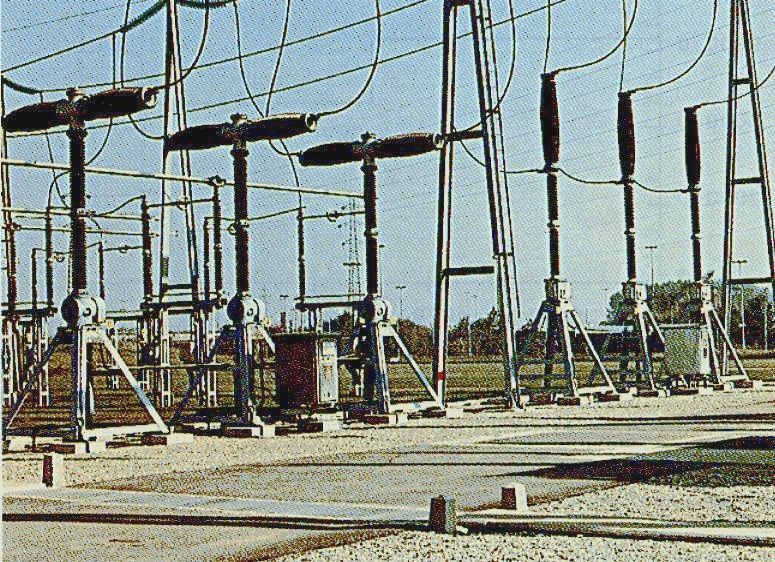 Circuit breaker